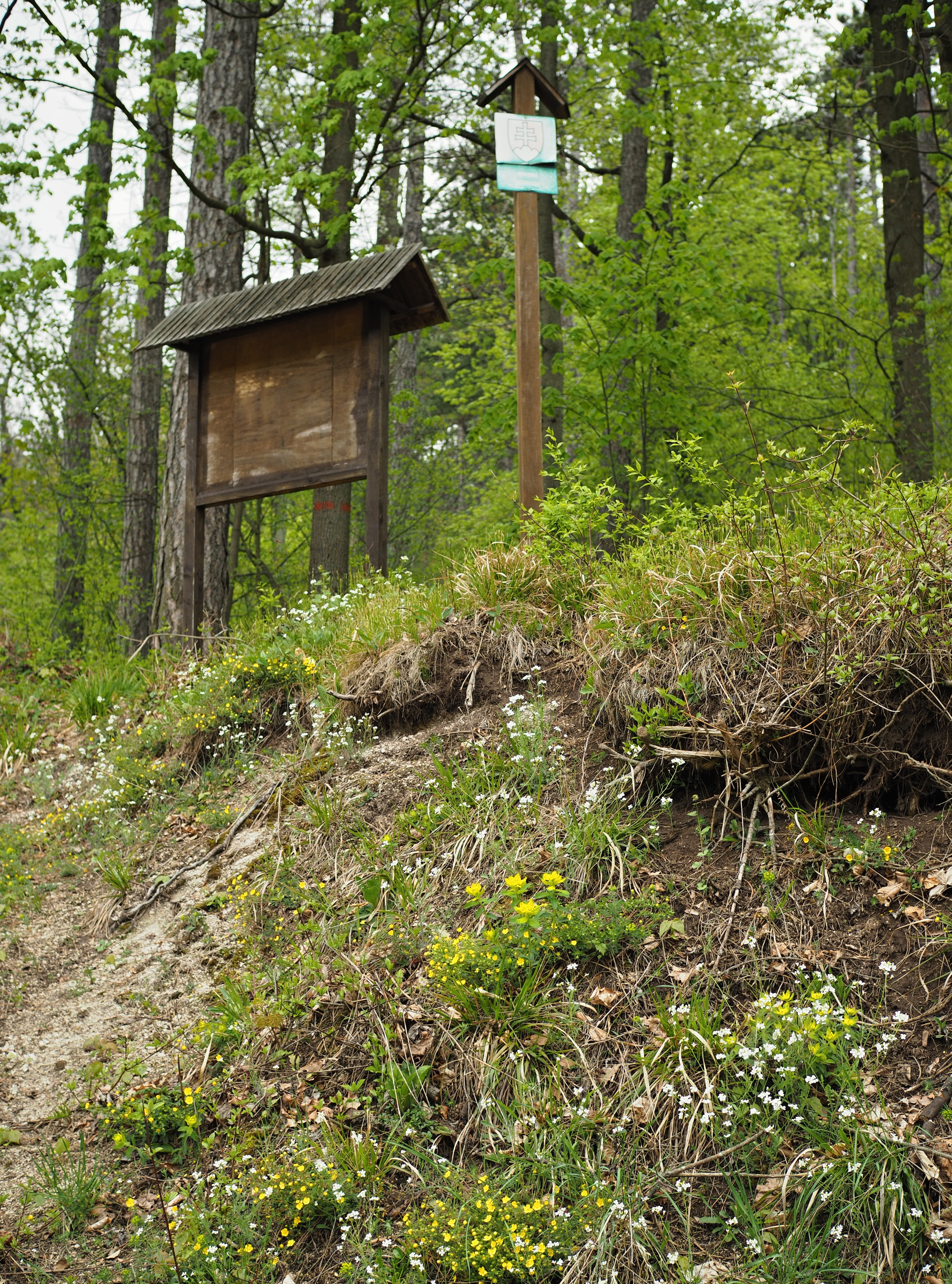 Přírodní rezervace Holé brehy